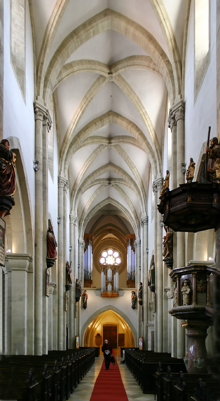 Einblick ins Langhaus des Wiener Neustädter Doms, Richtung Westen